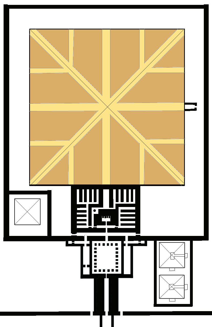 Structure armée de la pyramide de Sésostris Ier à Licht